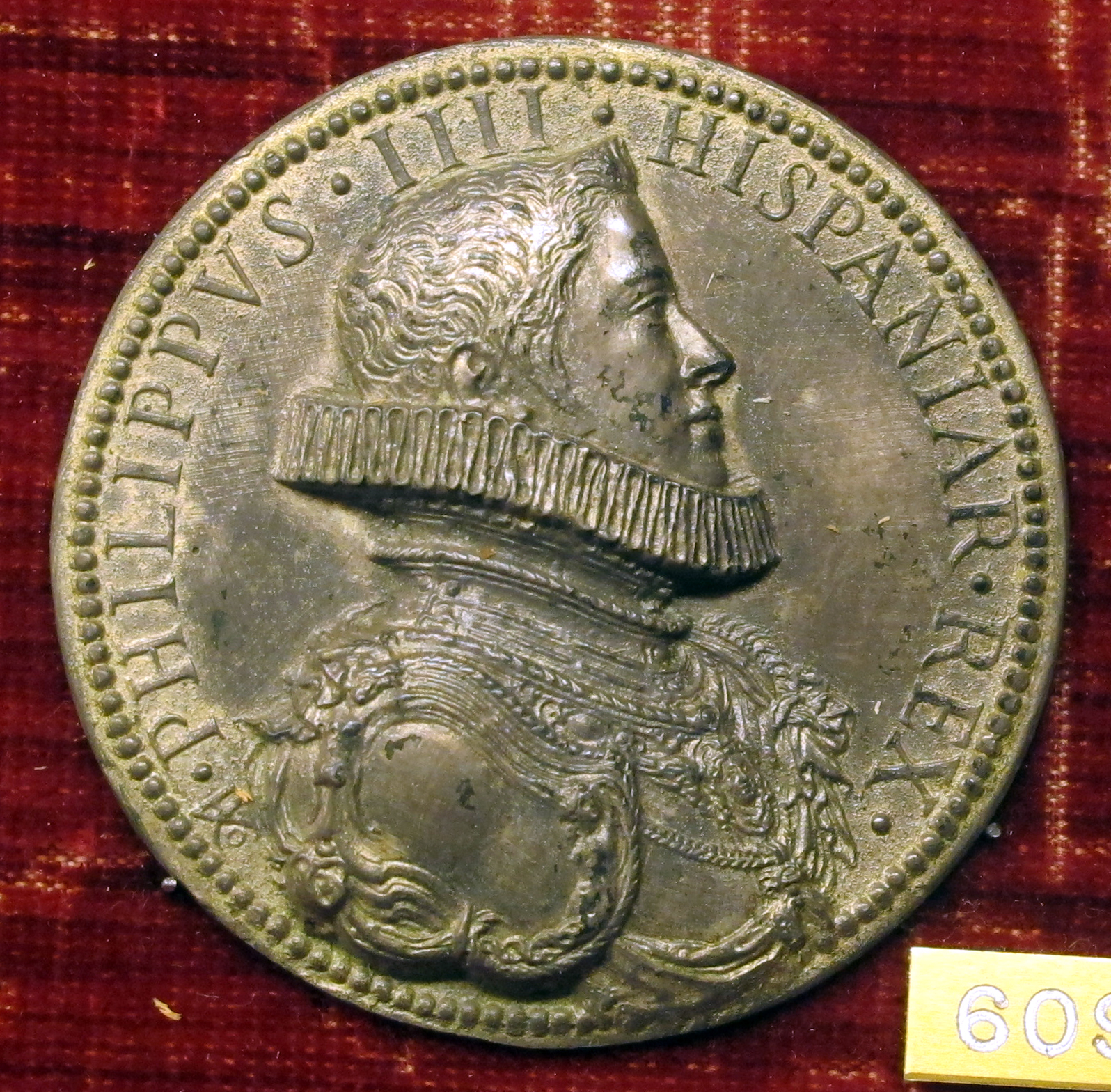 medaglia, vedi titolo